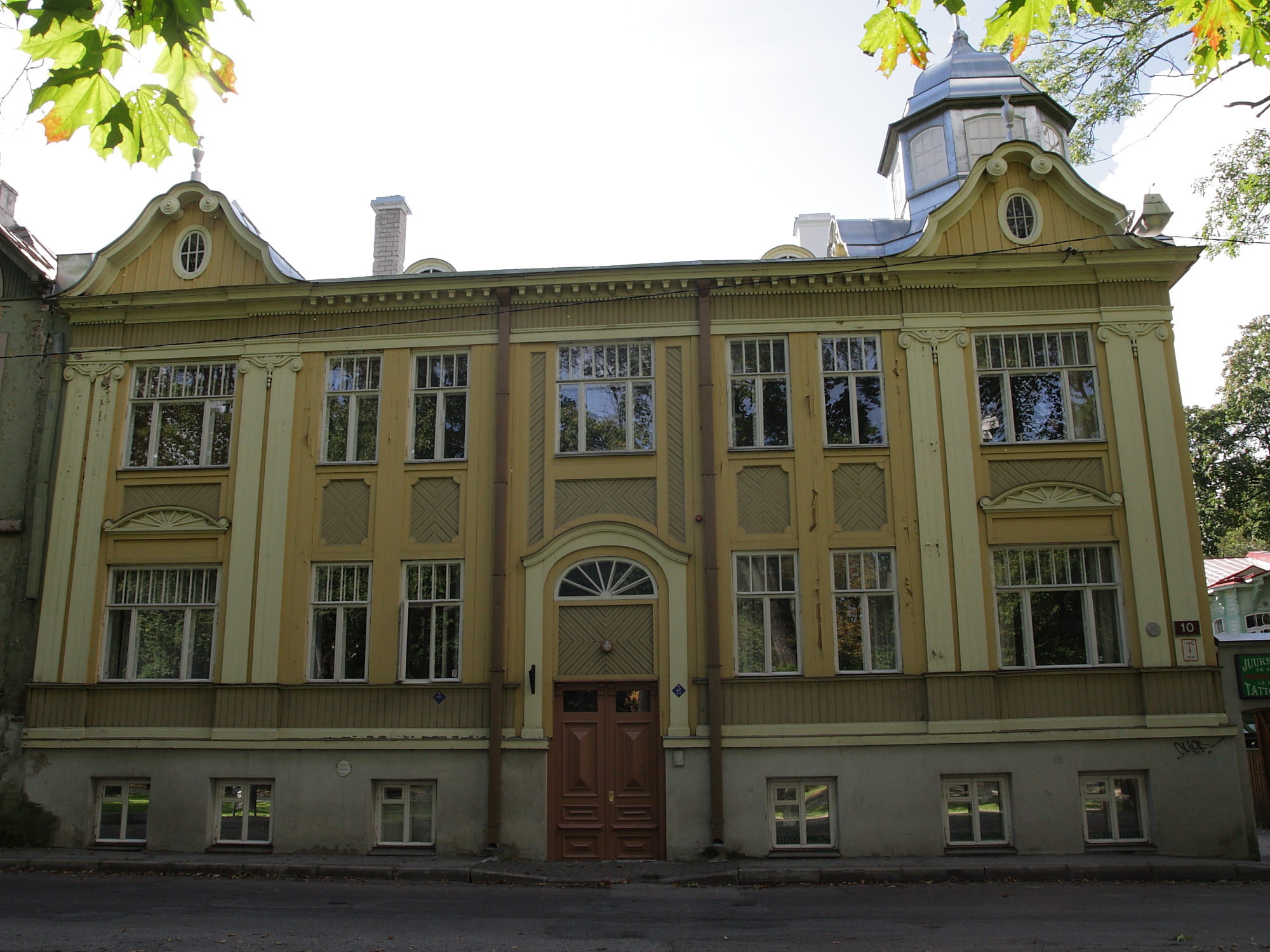 Tallinn, elamu L. Koidula 10, 1915